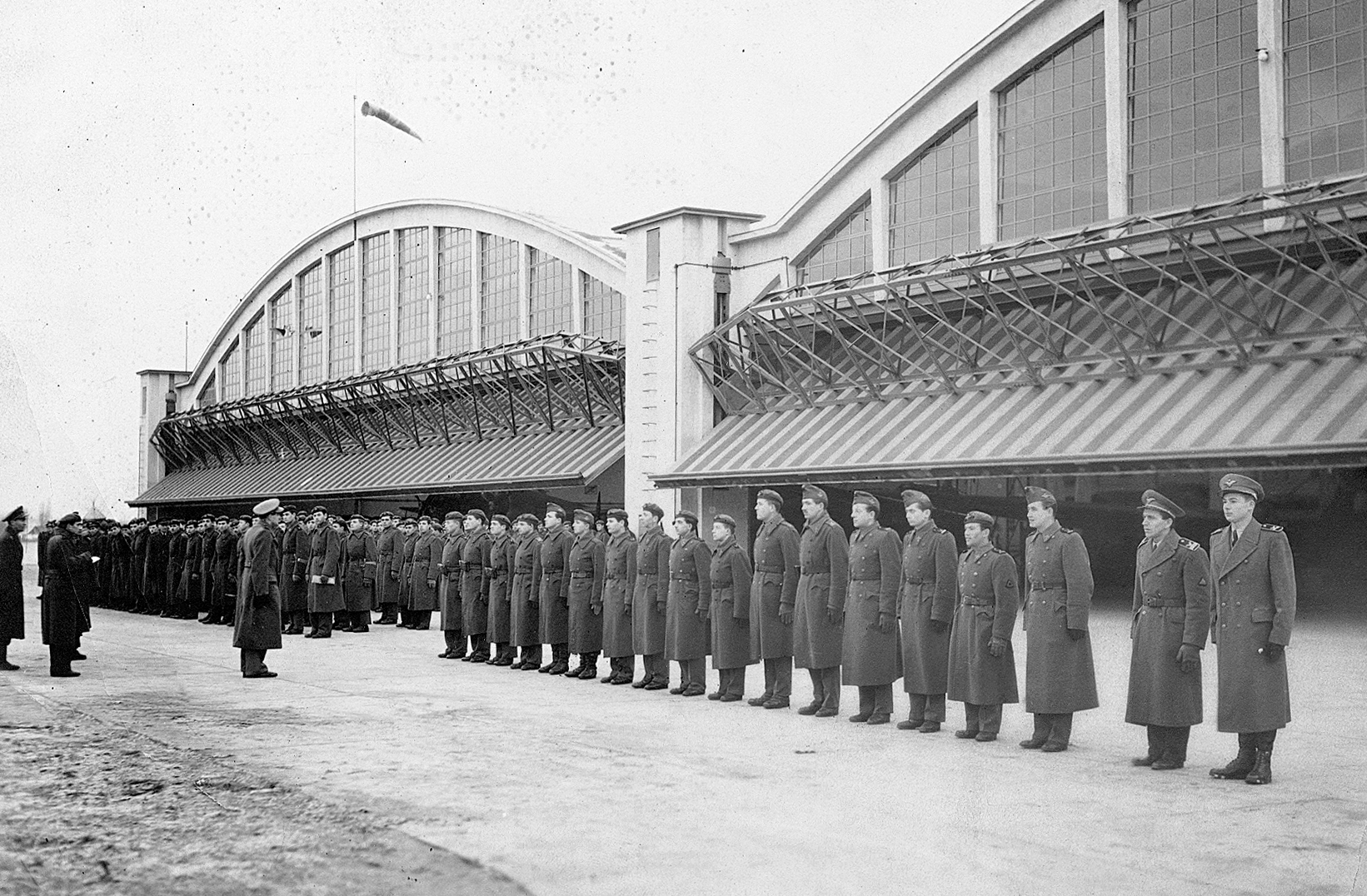 Epreskerti repülőtér. Location: Hungary, Debrecen Tags: airport, soldier, line-up, hangar Title: Epreskerti repülőtér.